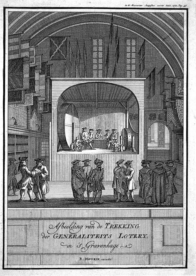 Trekking van de Generaliteitsloterij. Drawing of the Dutch States Lottery